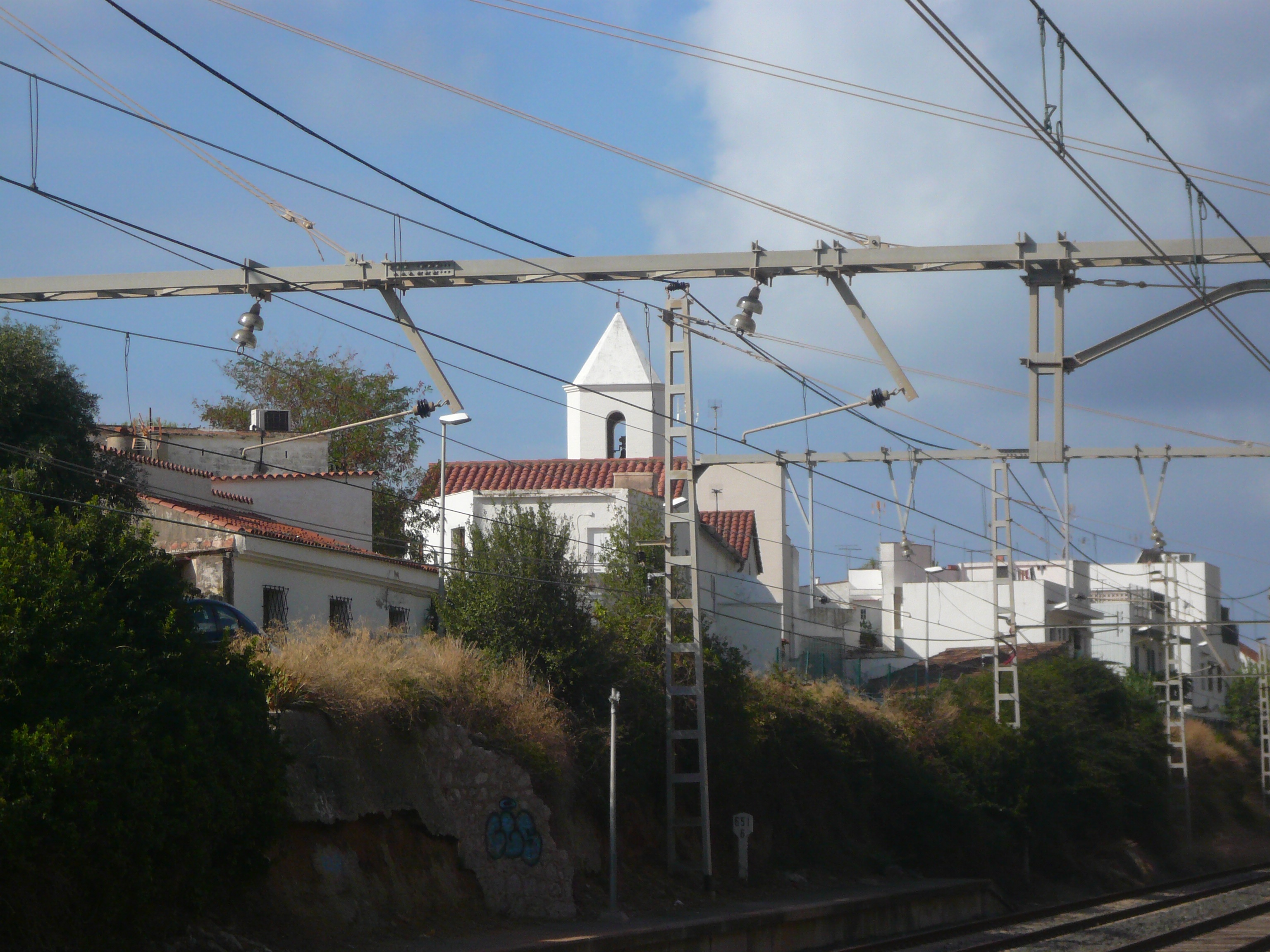 Església de Santa Maria (Sitges) Object location41° 15′ 10.56″ N, 1° 54′ 02.77″ E